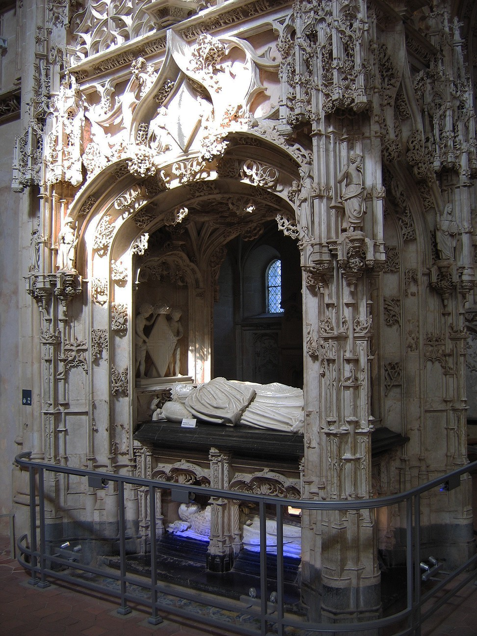 Abteikirche Brou, Bourg-en-Bresse, Nordportal